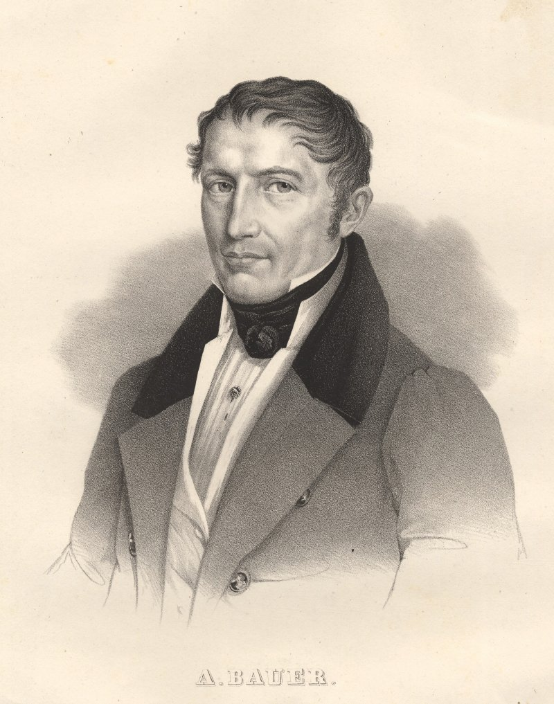 Portrait Anton Bauer, Rechtswissenschaftler (1772 - 1843) - Lithographie um 1830